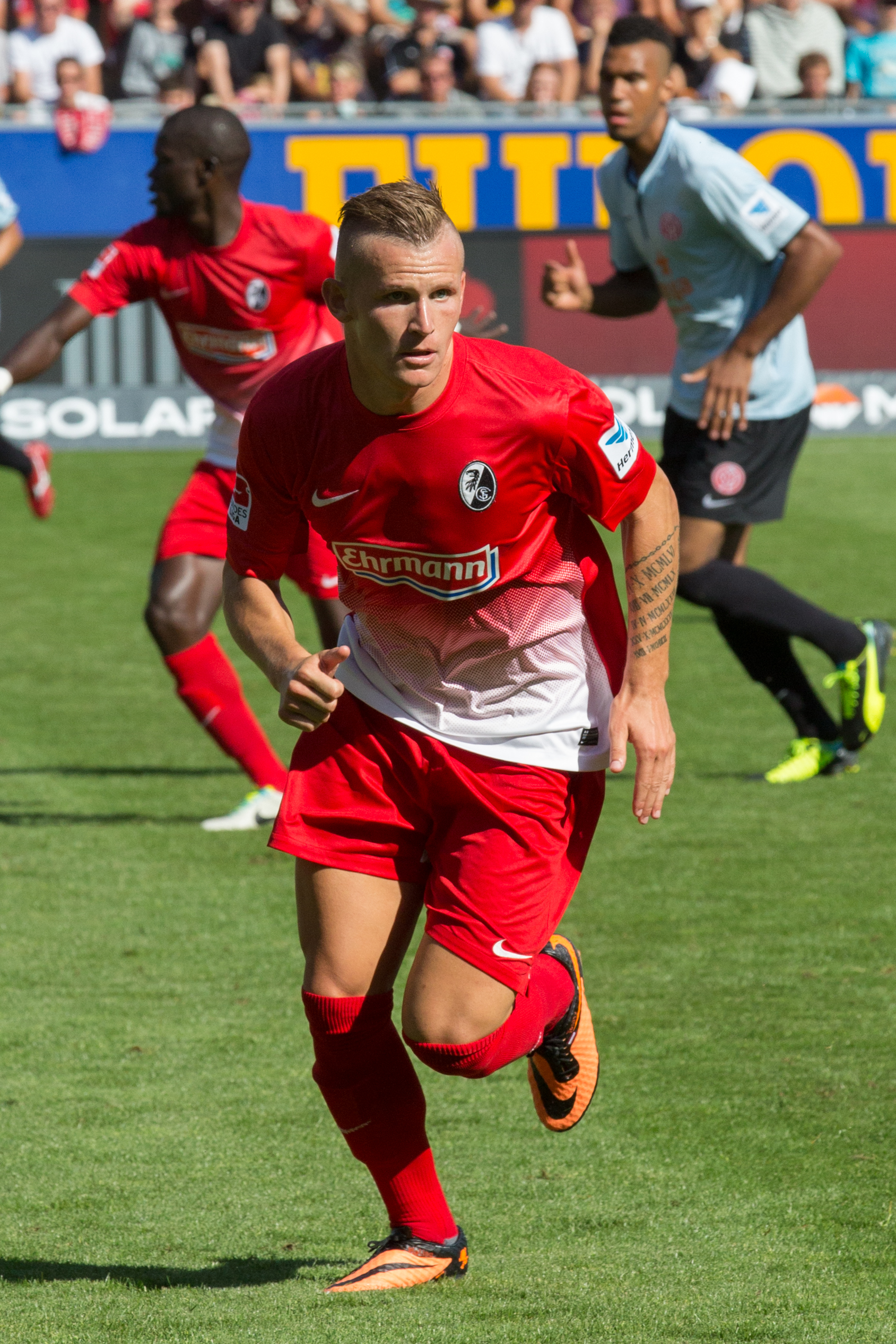 Jonathan Schmid SC Freiburg 17 août 2013